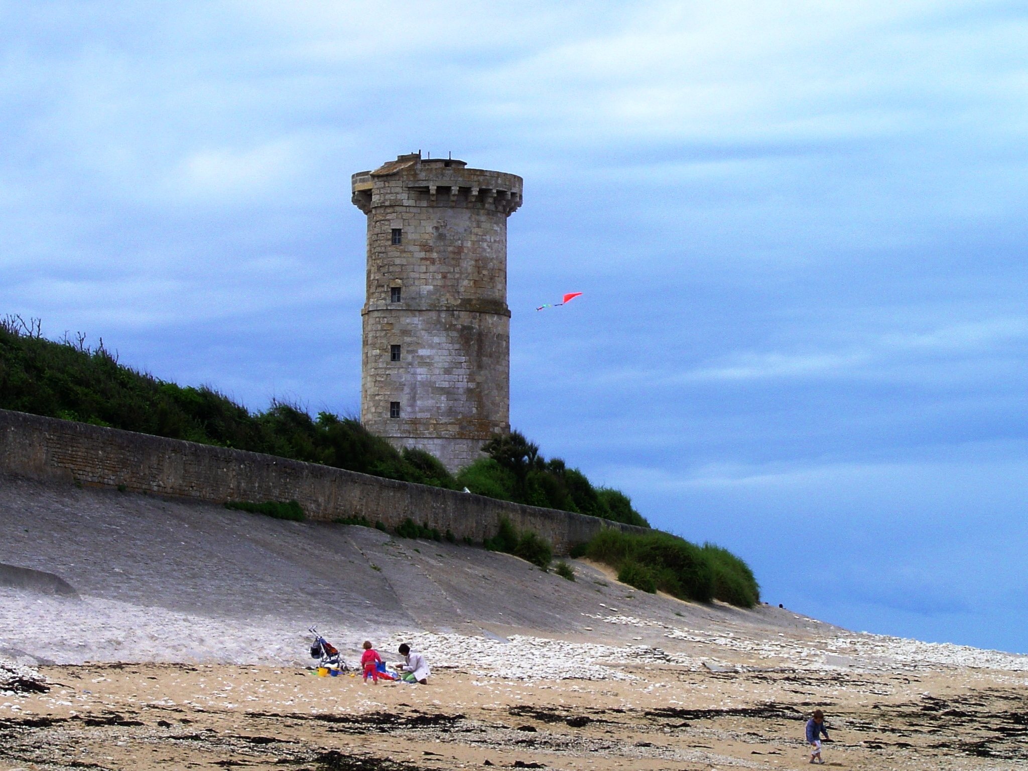 Phare des Baleines (le vieux), Île de Ré Altes Leuchtfeuer aus dem 17. Jahrhundert bei Saint-Clément-des-Baleines Foto erstellt von user:Ile-de-re am 19. Juni 2004)